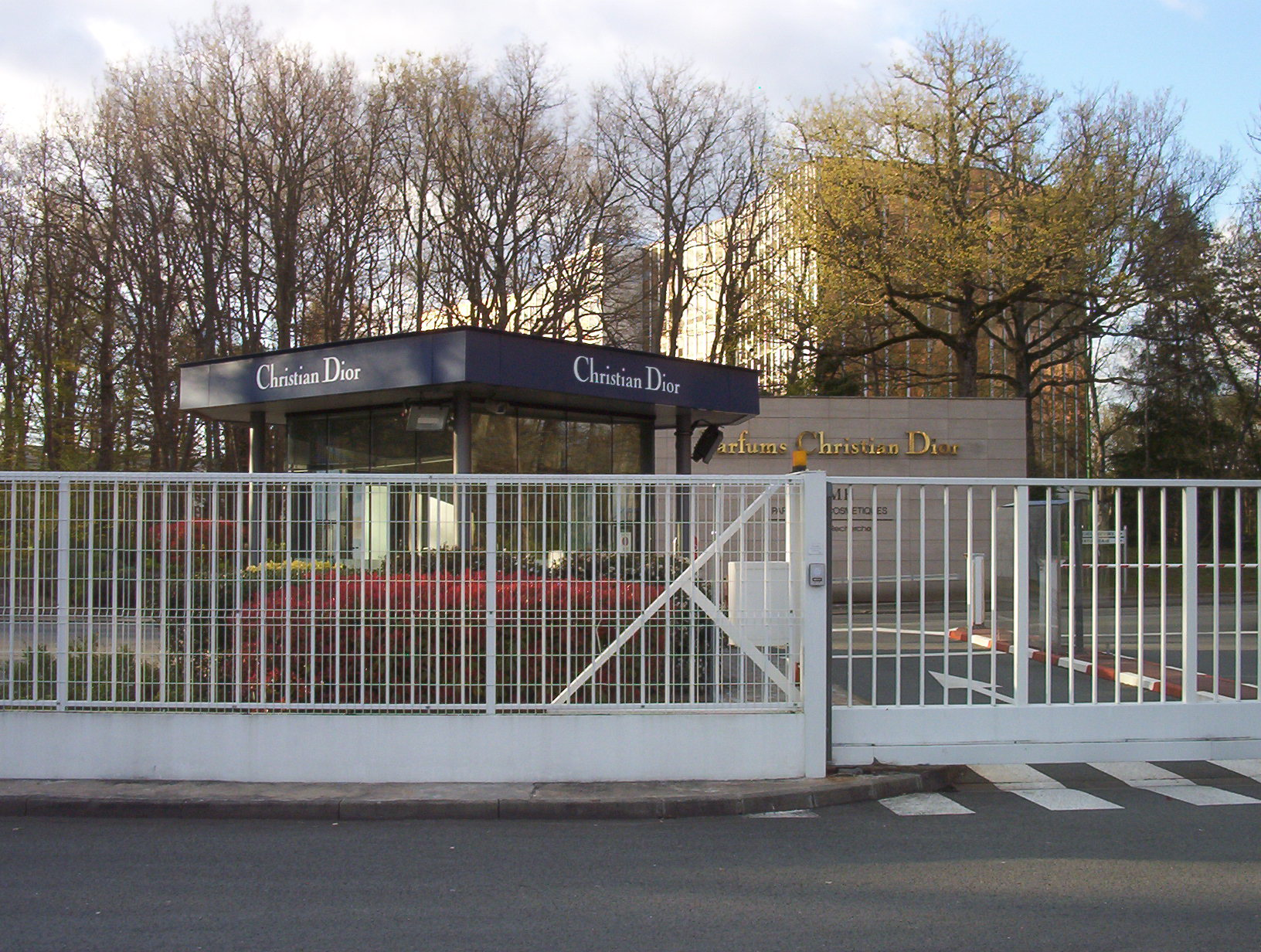 La photographie représente l'entrée de l'entreprise Christian Dior (groupe LVMH), à Saint-Jean-de-Braye dans le Loiret, en France. Le nom de l'entreprise est inscrit en grandes lettres dorées sur le bâtiment d'entrée ; l'arrière-plan montre l'espace boisé caractéristique de la richesse environnementale du pôle économique de Charbonnières, dans lequel est implantée l'entreprise. Celle-ci emploie environ 1 500 personnes sur ce site.